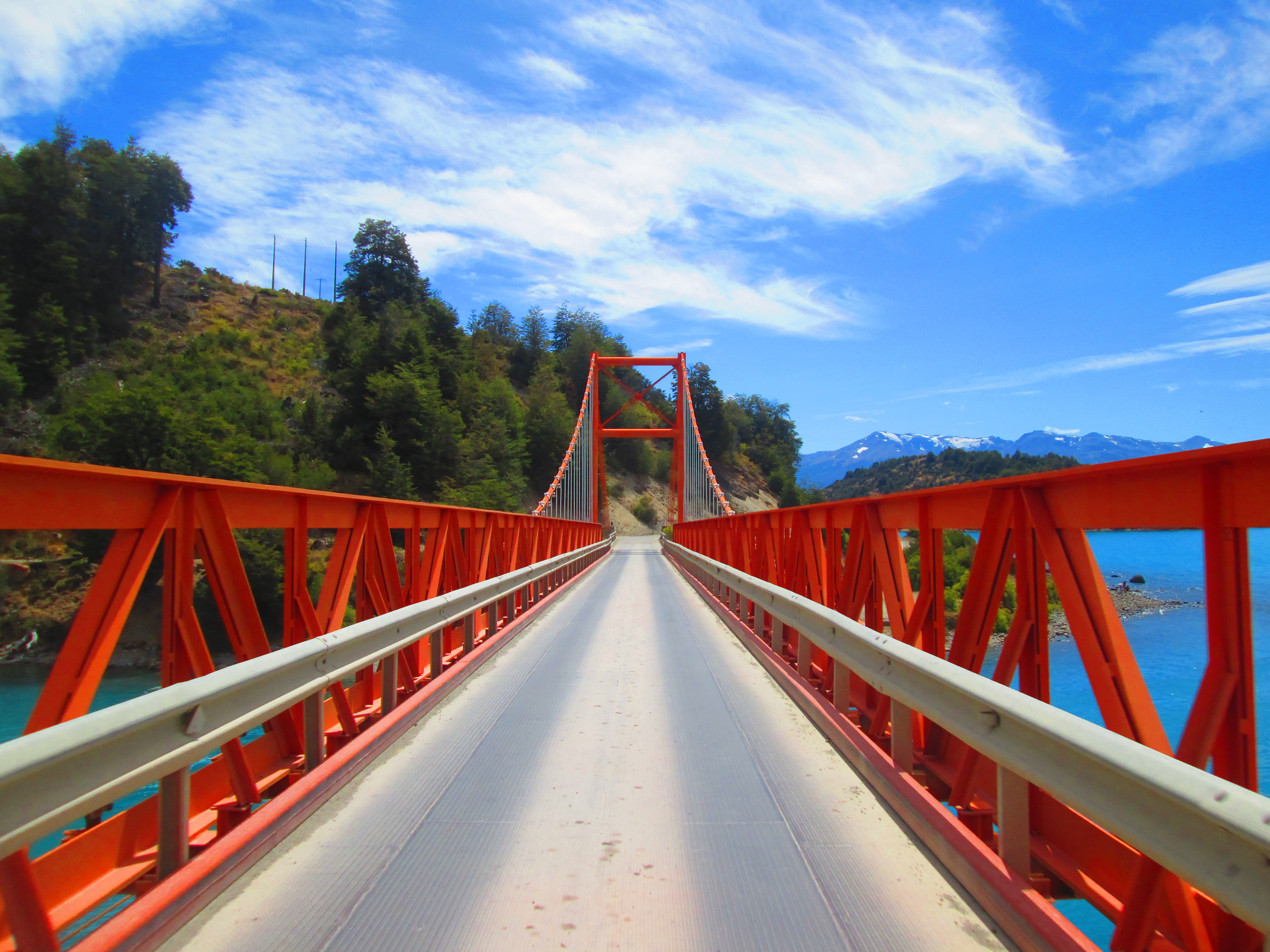 Puente General Carrera desde el sur.